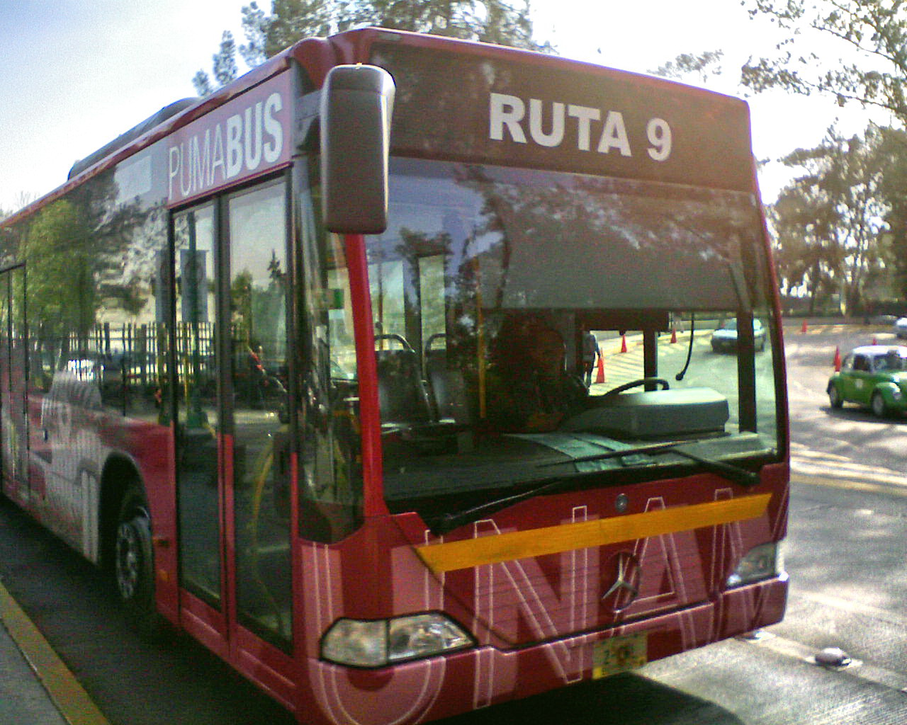 PumaBús ruta 9 en la parada Camino Verde frente al Conjunto Sur de la Facultad de Ingeniería